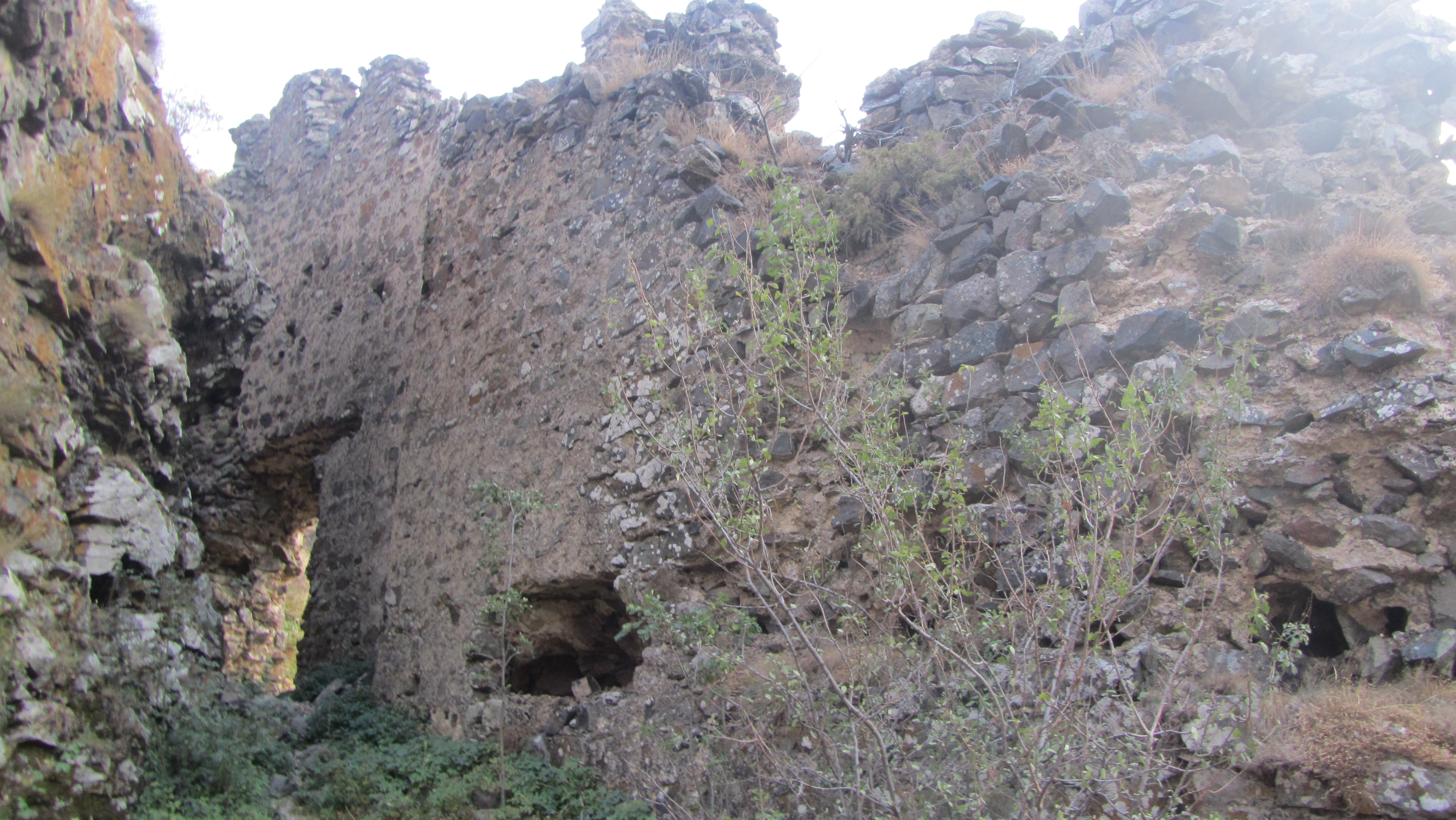 Ամրոց Բաղաբերդ (Դավիթ Բեկի բերդ) - Անդոկավան - քաղաքից ամ, Քաջա­րան տանող մայրուղուց ձախ, Ողջի գետի և նրա ձախ վտակ Գիրաթաղ գետակի միջև, բար­ձունքի վրա - Սյունիքի նշանավոր ամրոցներից էր, կիսավեր 13.1/1